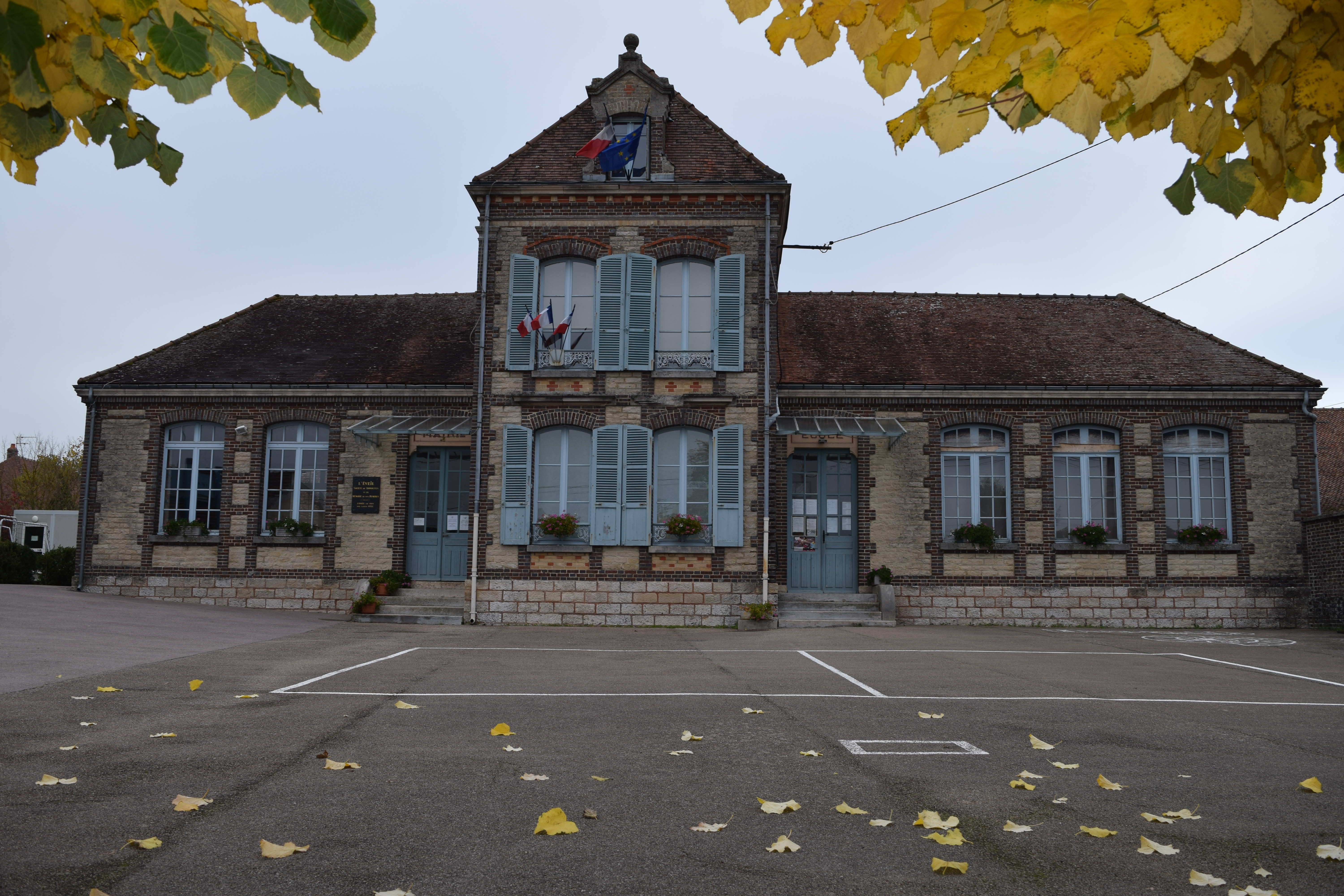 Mairie et école de Mesnil-Sellières